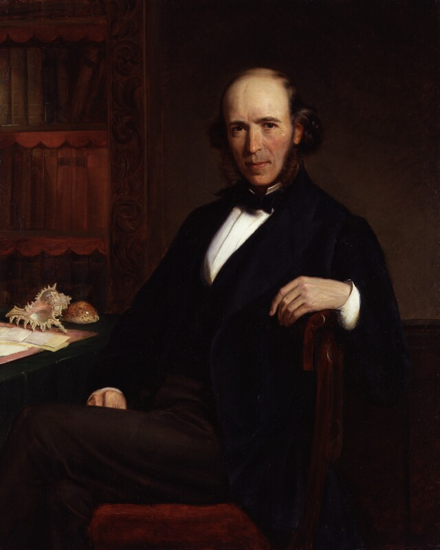 Herbert Spencer, oil on canvas, 1872